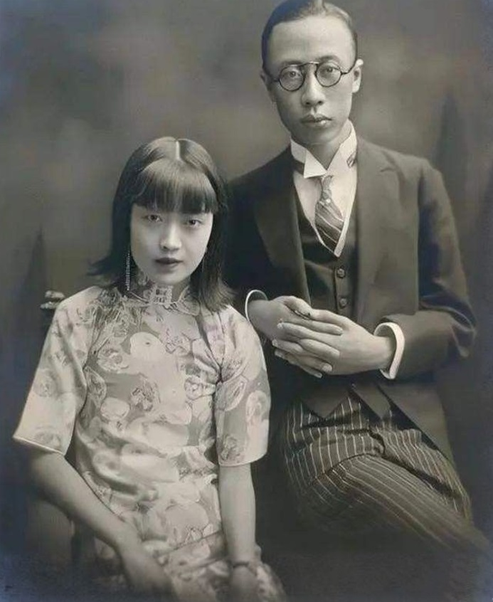 溥仪和婉容的生活照